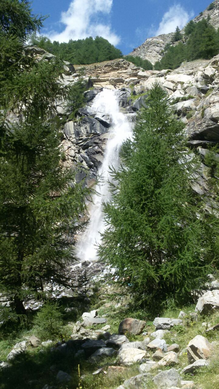 La cascade de Lillaz (Cogne)